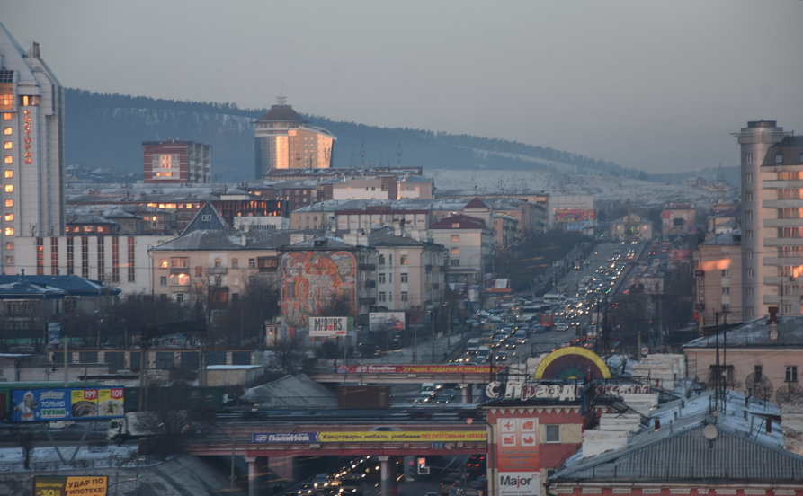 Center of Railway area of the city of Ulan-Ude